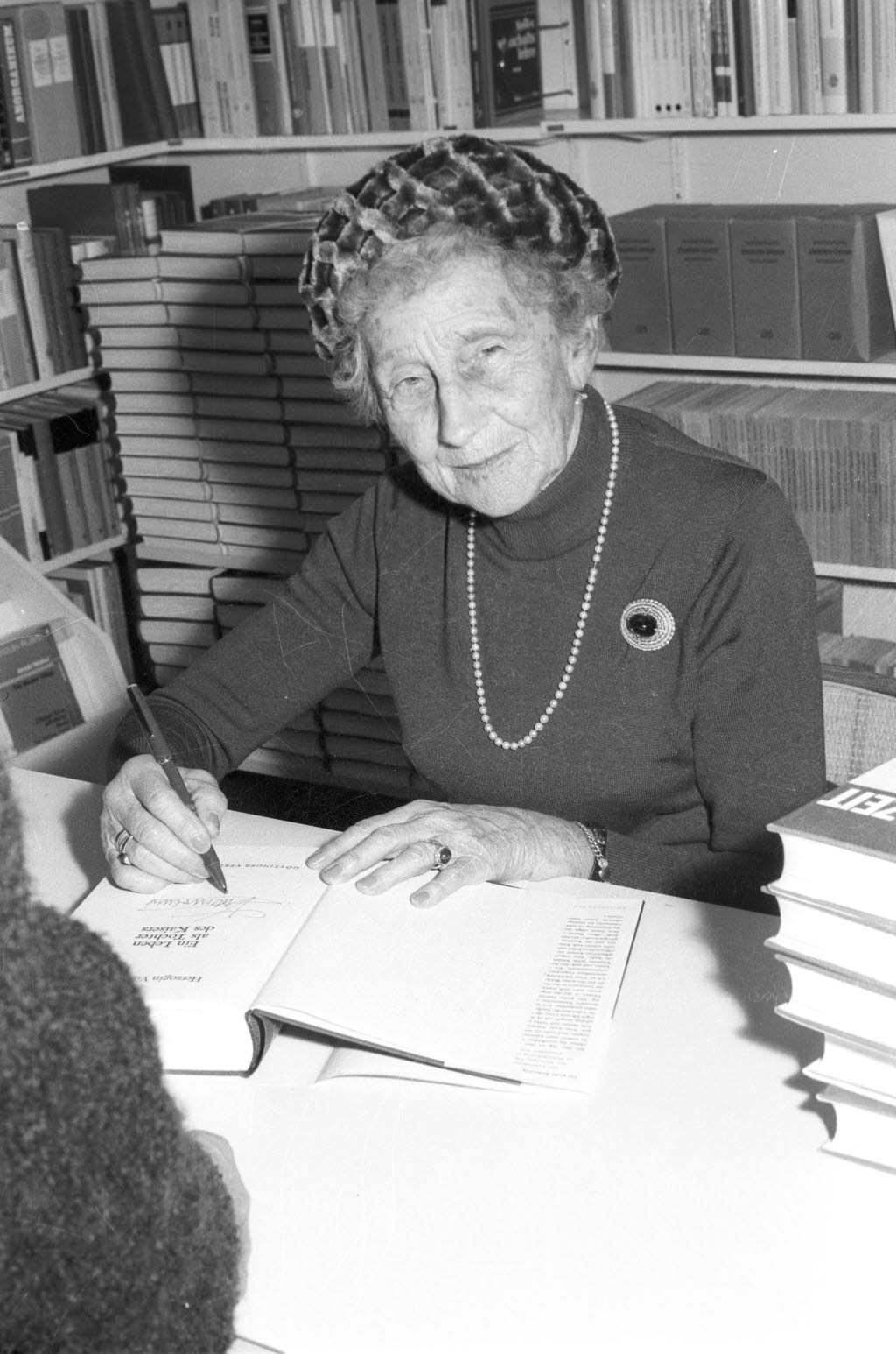 Die Tochter des letzten deutschen Kaisers signiert in der Buchhandlung Dawartz ihre Bücher "Ein Leben als Tochter des Kaisers" und "Bilder der Kaiserzeit".